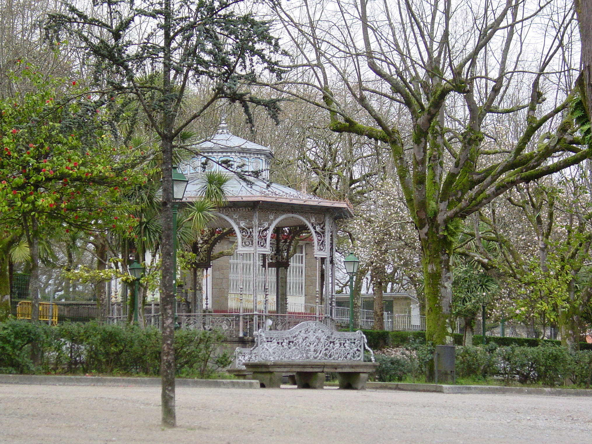 self made. Santiago de Compostela. Alameda.